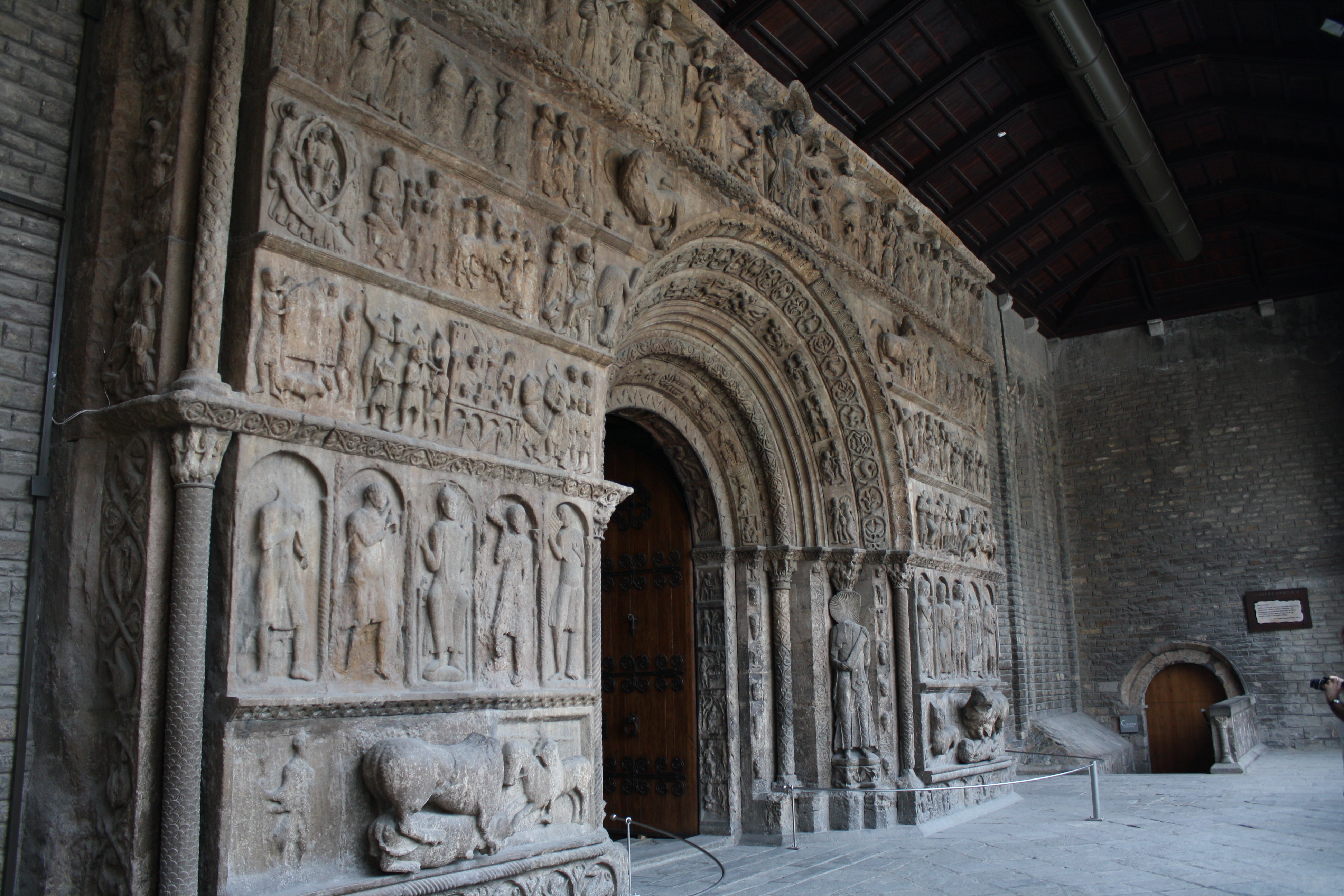 Portalada romànica del Monestir de Ripoll (s. XI-XII), una de les poques seccions del recinte original que encara es conserven.